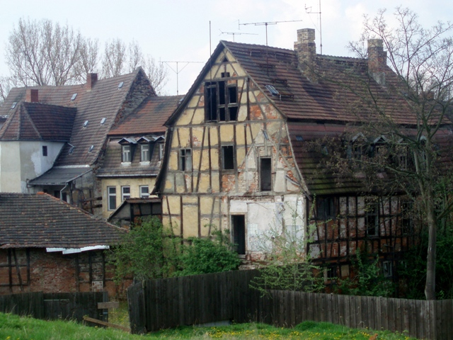 ruinöse Häuserreihe im Altstadtviertel Brühl von Zeitz